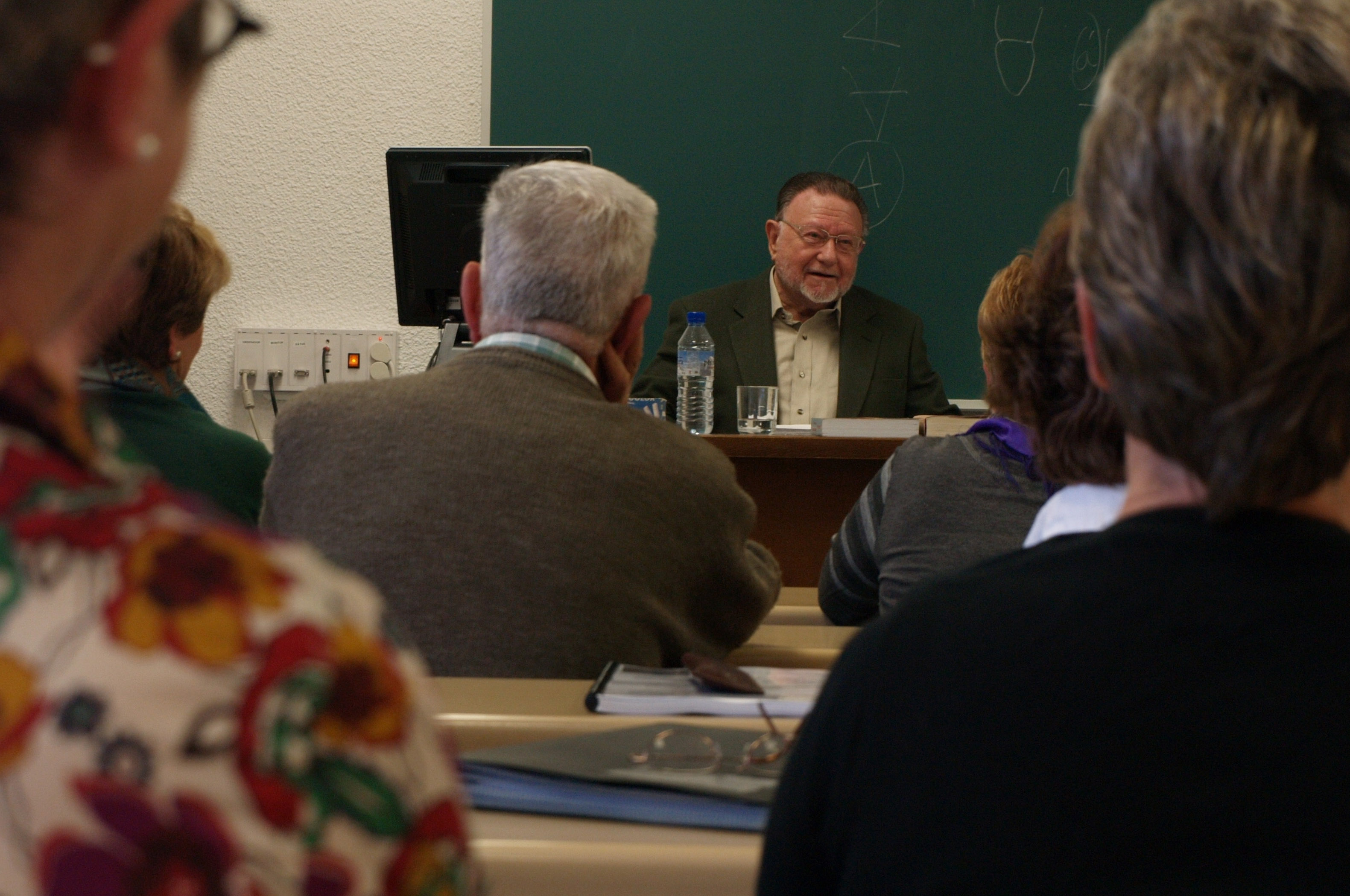 Medardo Fraile, en un aula de la Universidad de La Rioja.